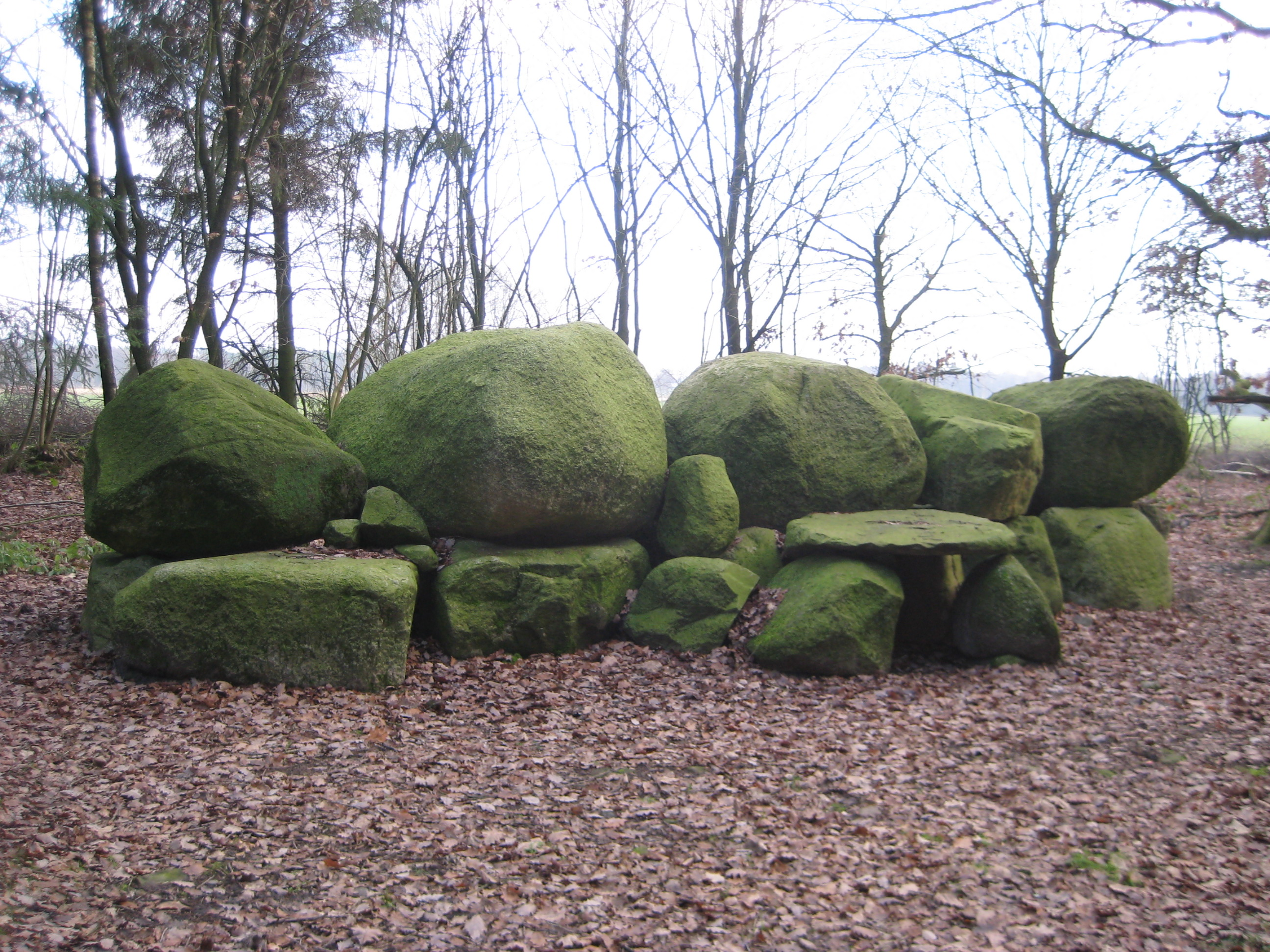 rekonstruiertes Megalithgrab in Ahlerstedt, Ortsteil Ottendorf, Samtgemeinde Harsefeld